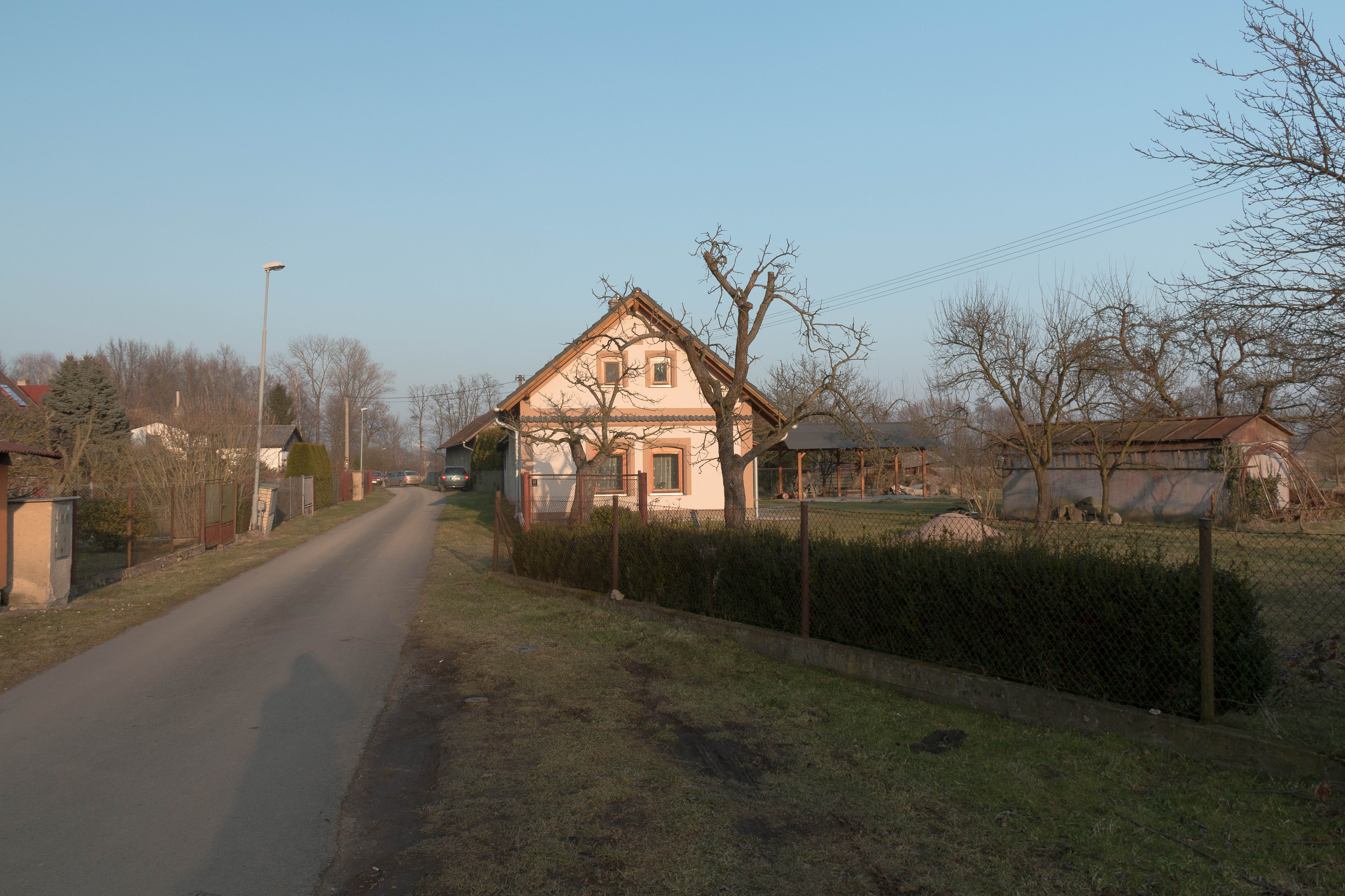 Novinsko čp. 46